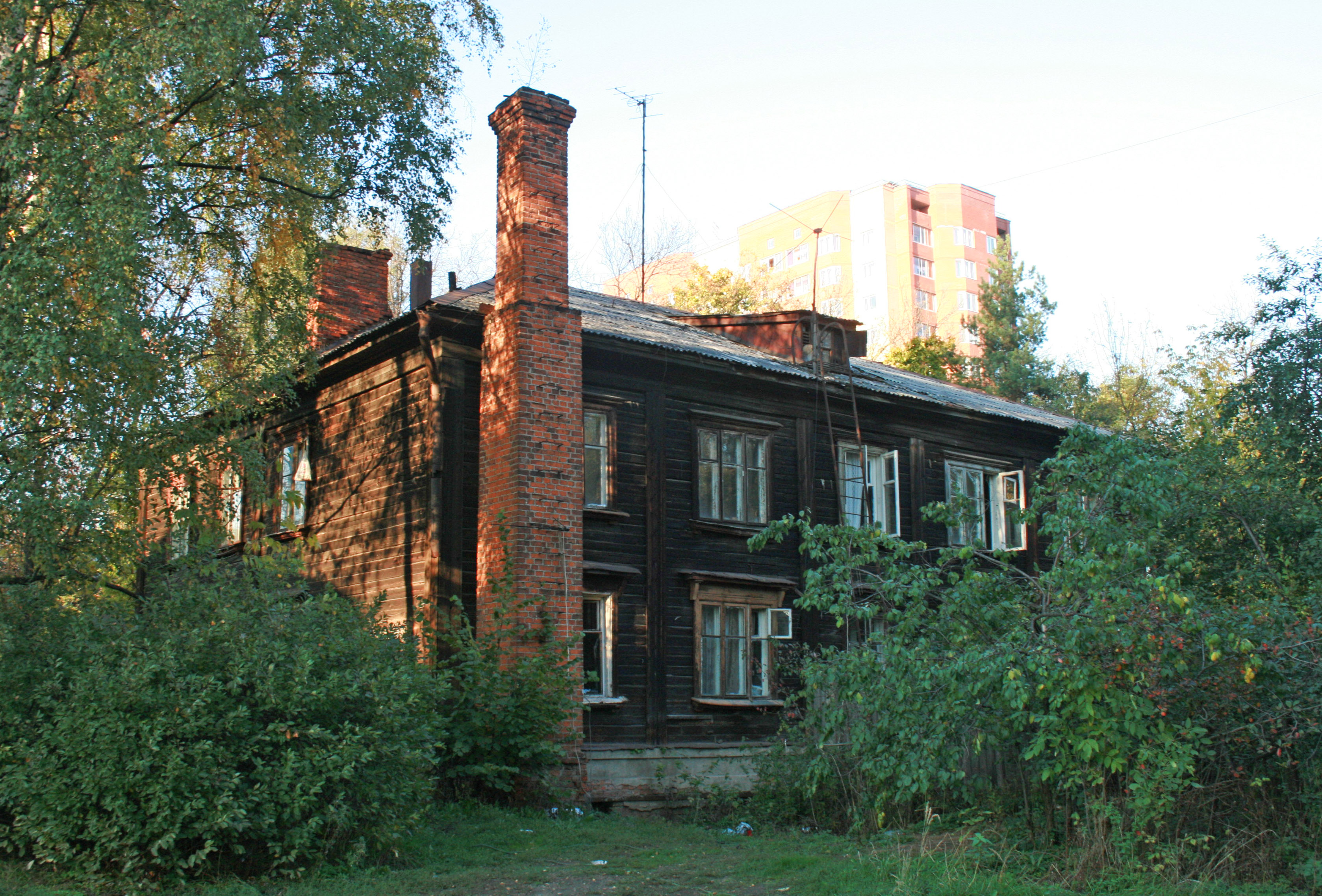 Деревянный дом в городе Ивантеевка Московской области.